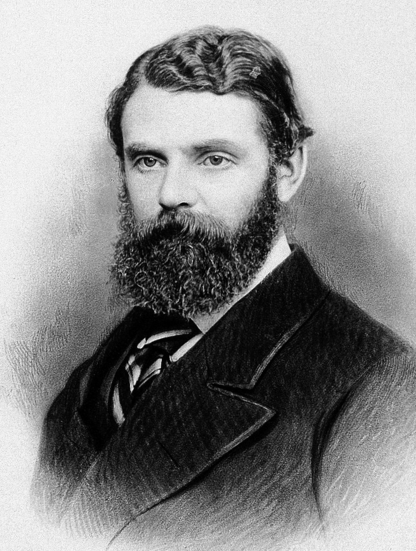 Francis E. Anstie